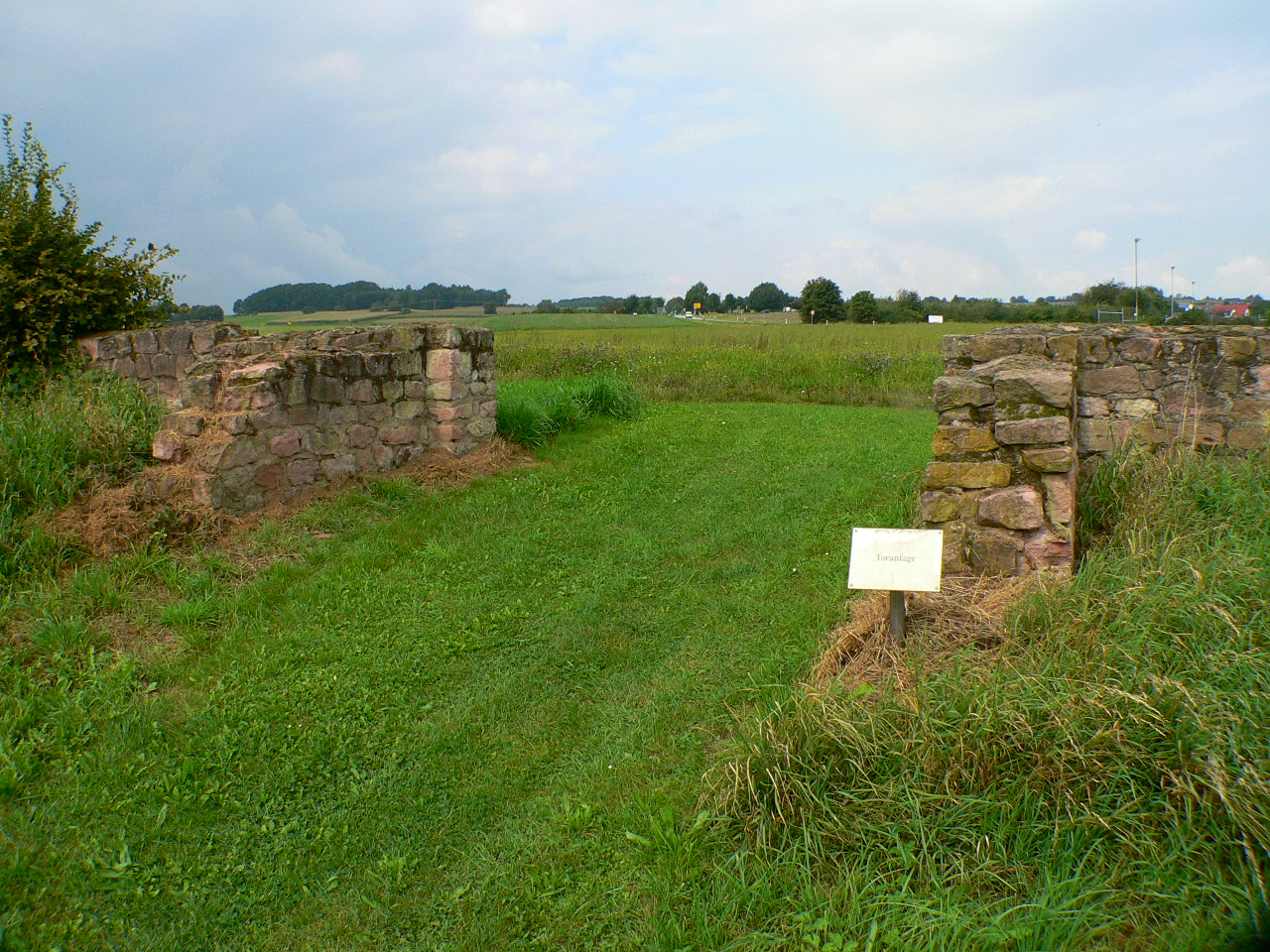 Römische Villa Haselburg im Odenwald, Hessen, Reste des Eingangstors